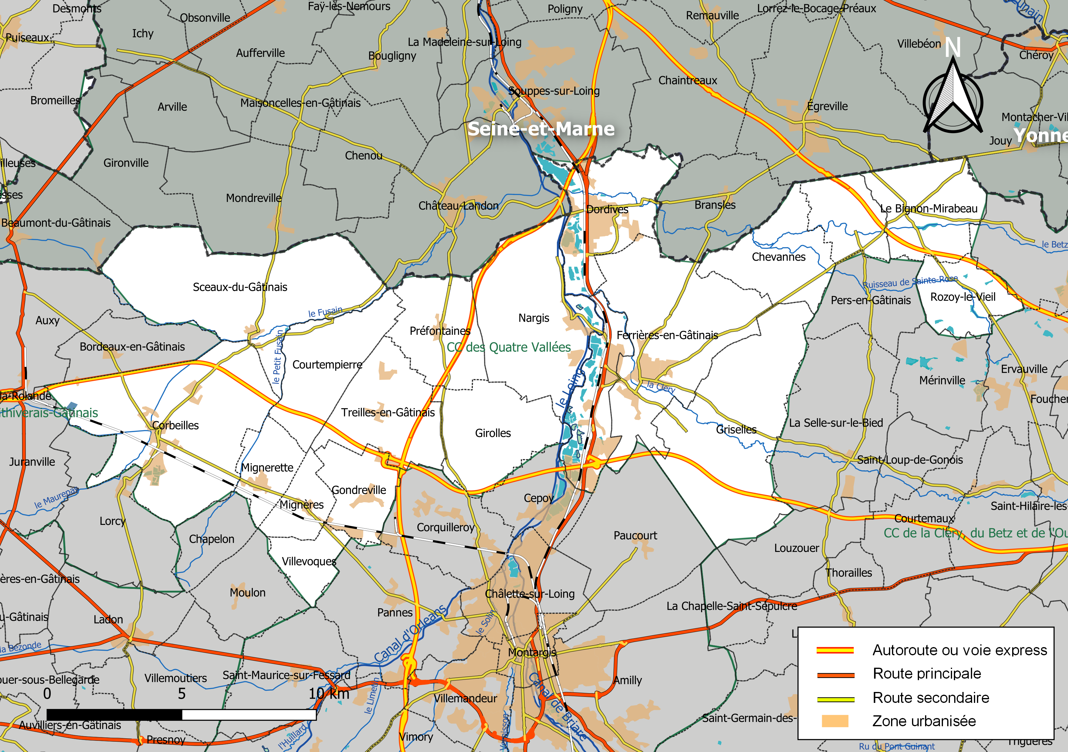 Carte de la communauté de communes des Qautre Vallées, département du Loiret, France. Composition au 1er janvier 2019.